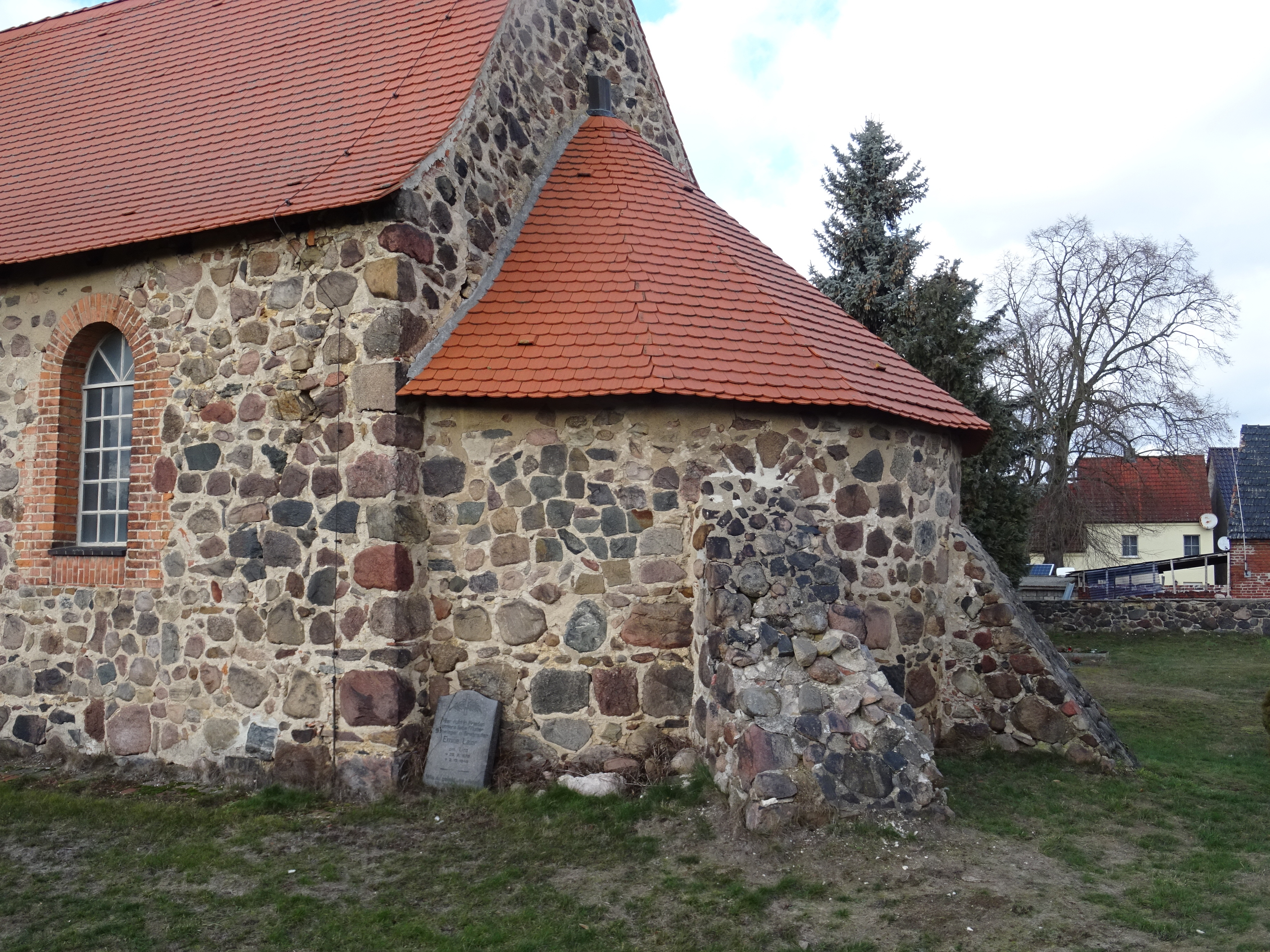 Denkmalgeschützte Dorfkirche in Wergzahna, Gemeinde Niedergörsdorf, Chor